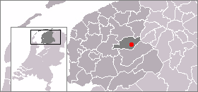 Locatie van Drachten, zelf gemaakt uit sjabloon van Wikipedia-gebruiker Mtcv